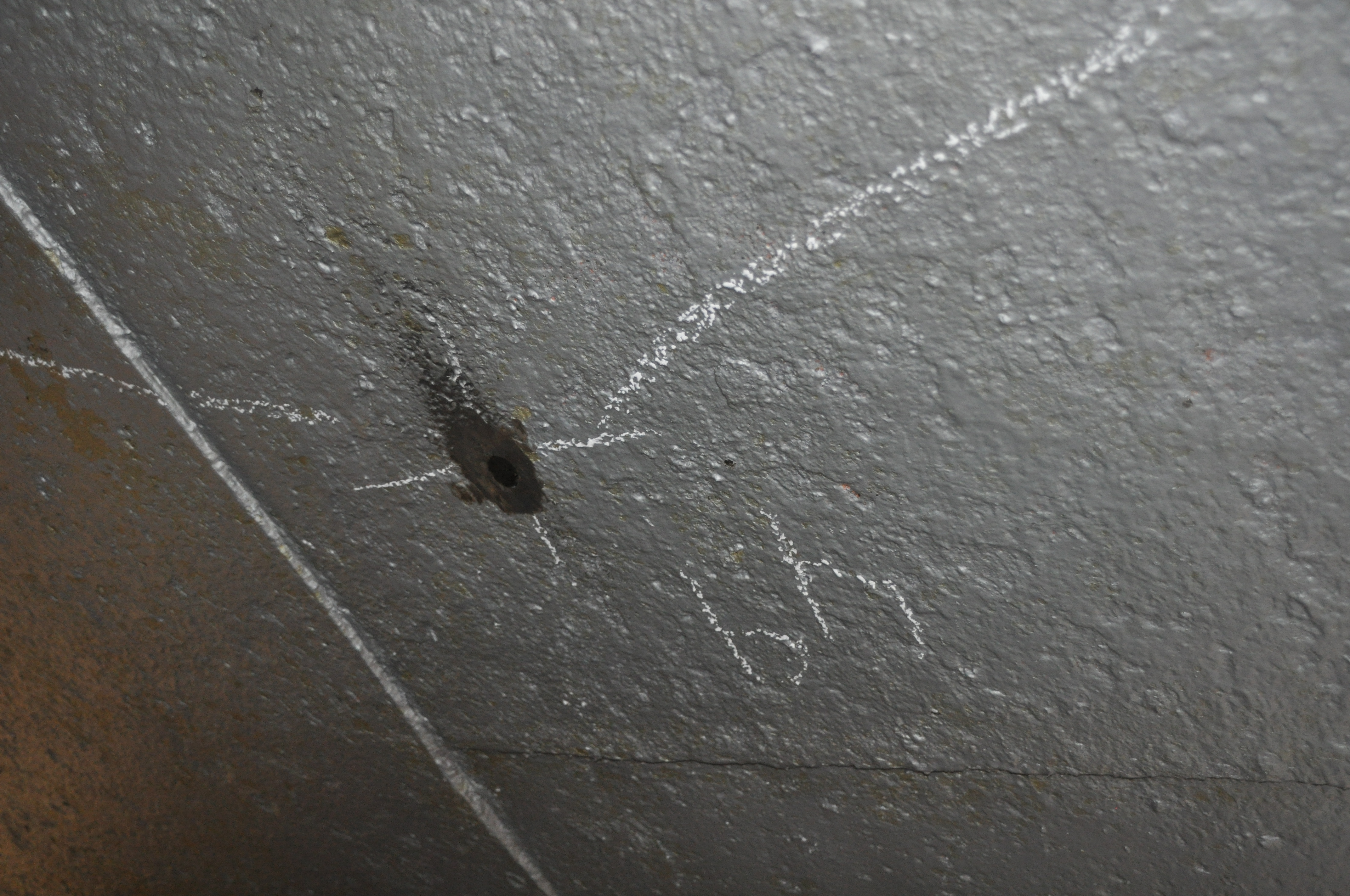 Gemeten vlakdikte 4,9 mm onder de Stella Maris.